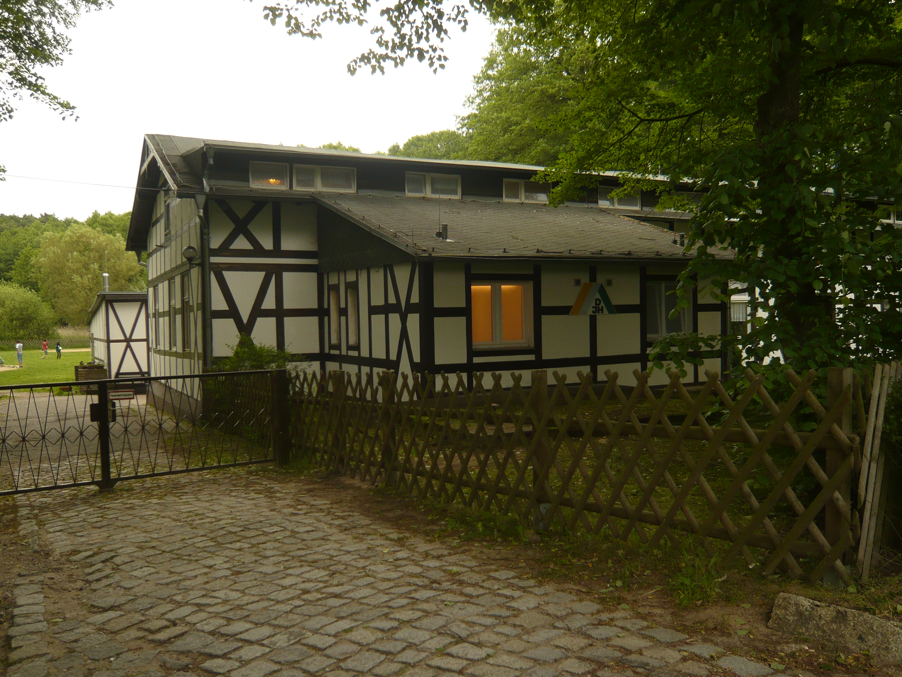 Wandlitz / Ützdorf: Jugendherberg